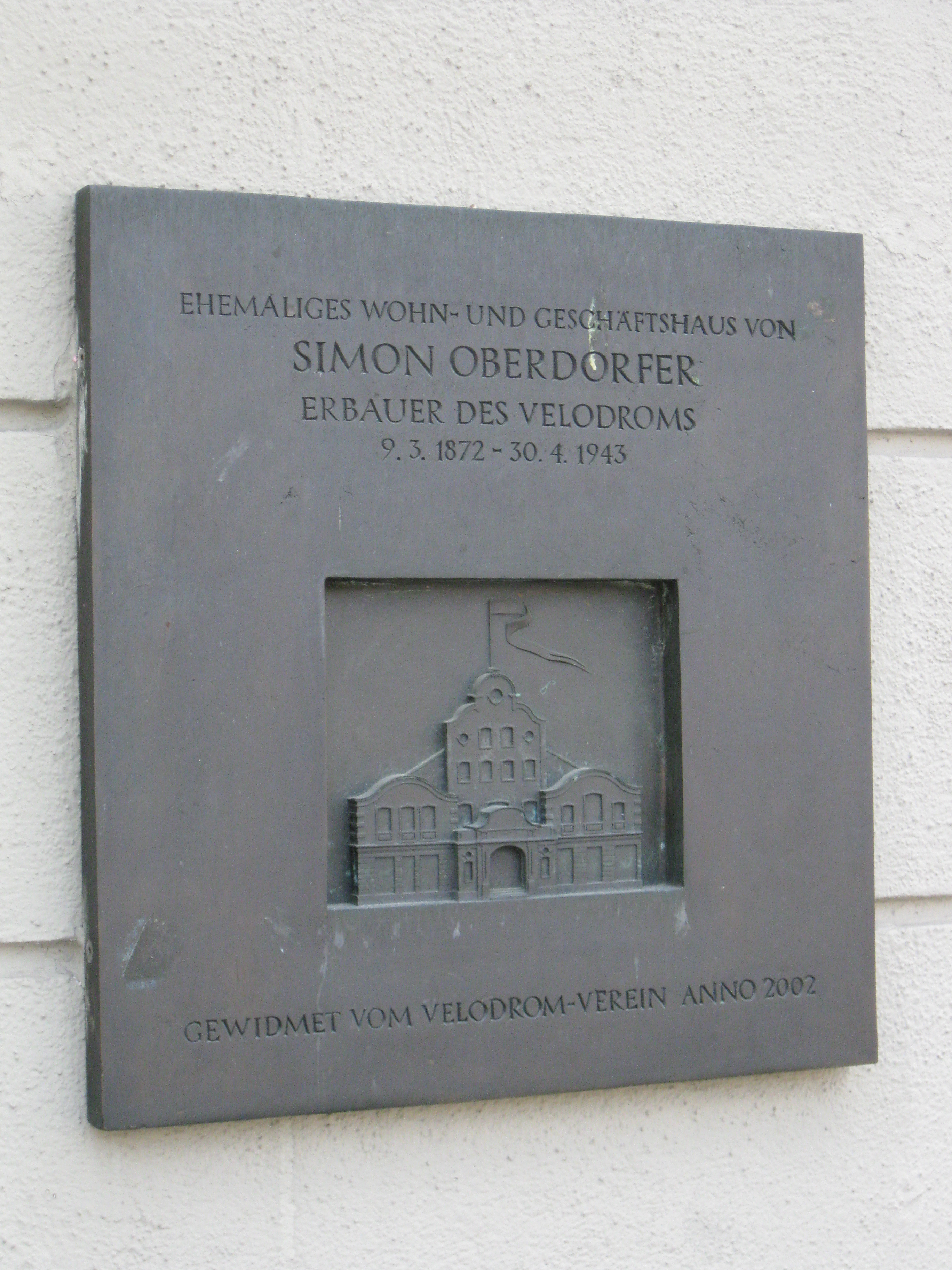 Regensburg